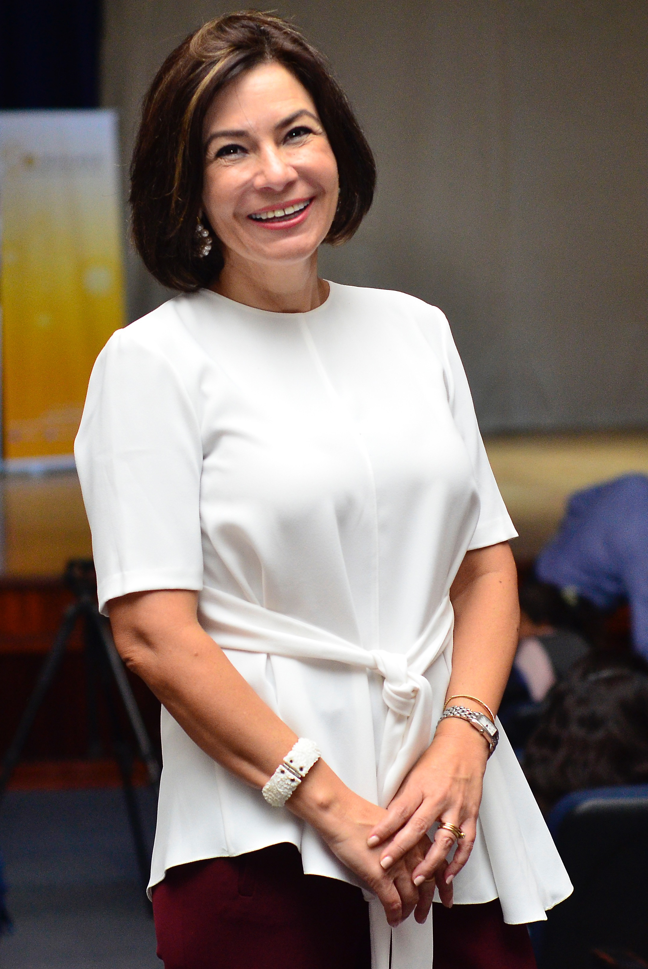 Nathalie Cely, fundadora de Fundación E.dúcate